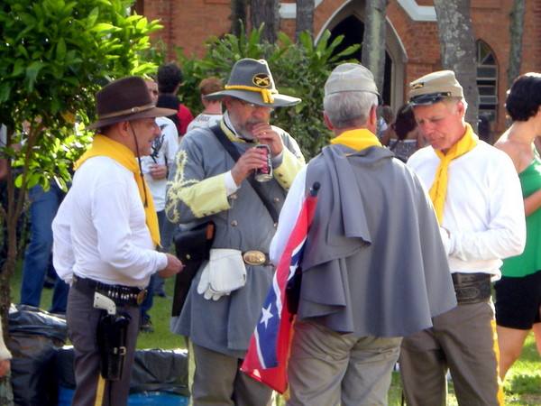 Decendentes norte-americanos durante a Festa Confederada